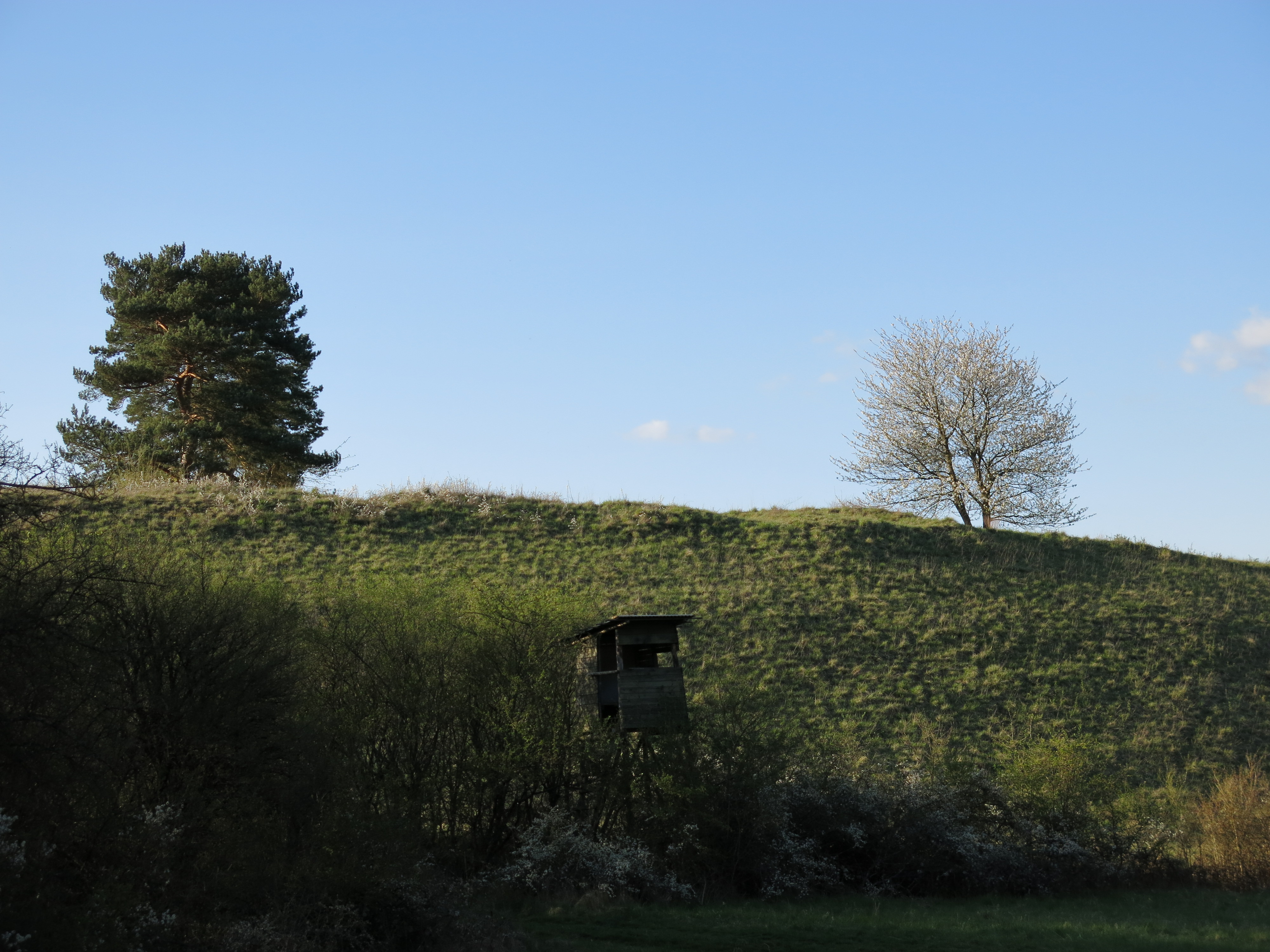 NSG Grainberg-Kalbenstein-Saupurzel, Geotop Flugsande